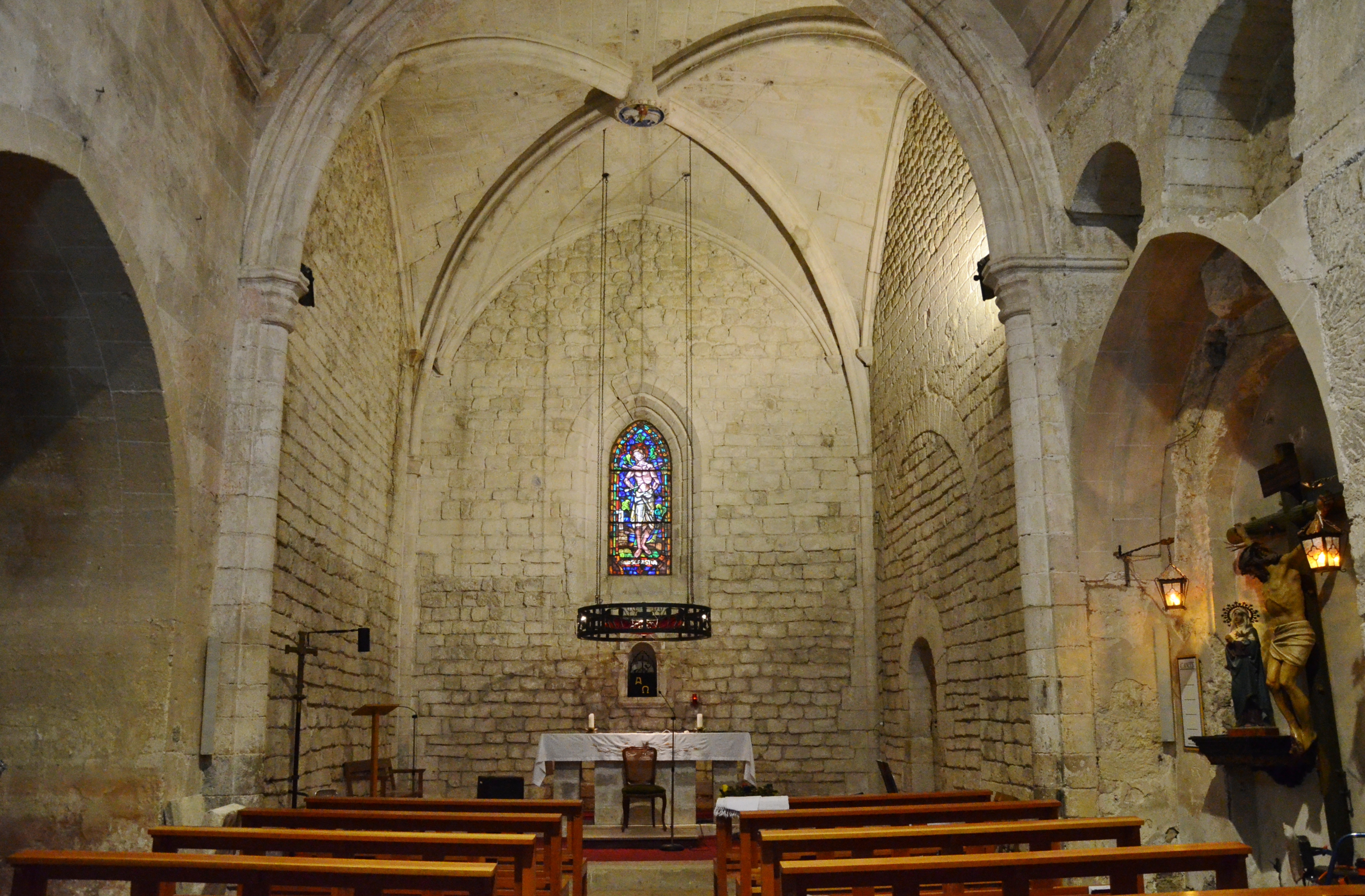 Monestir de Sant Sebastià dels Gorgs (Avinyonet del Penedès)